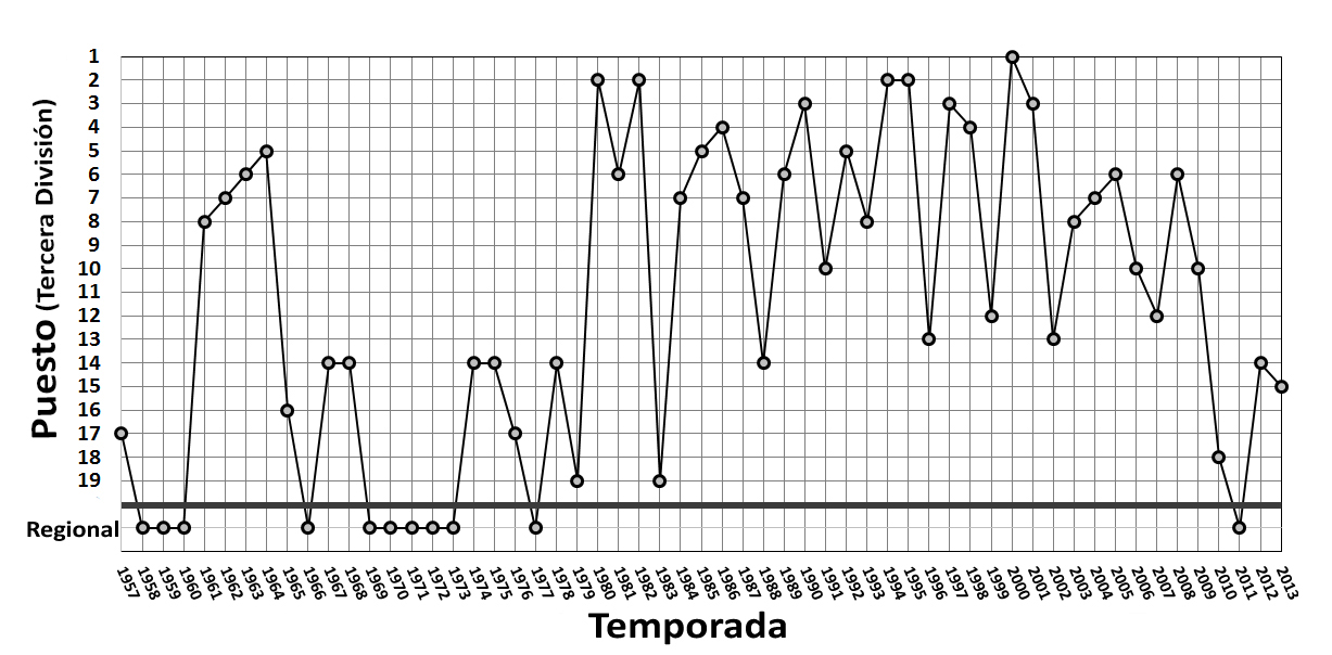 Esta gráfica muestra la evolución en competición del CD Salmantino (o UD Salamanca B)